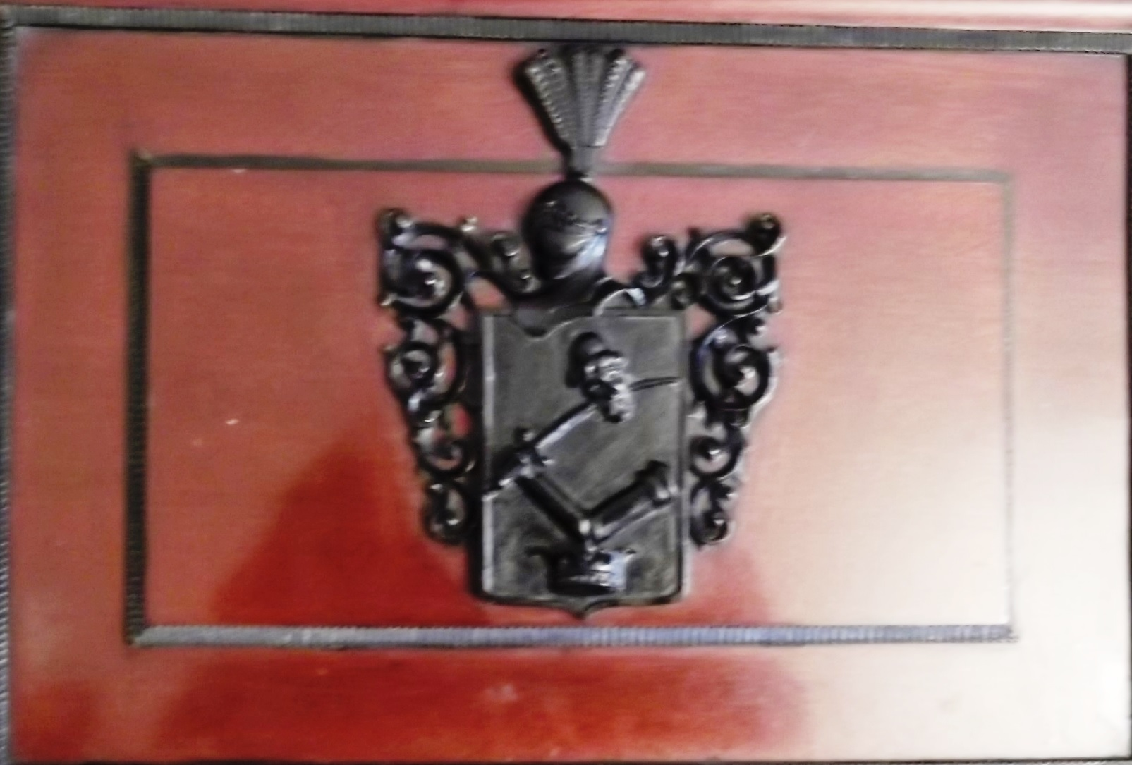 Sipos Béla (1875-1967) nagyapám készítette a dobozt, amin rajta van a Sipos család cimere